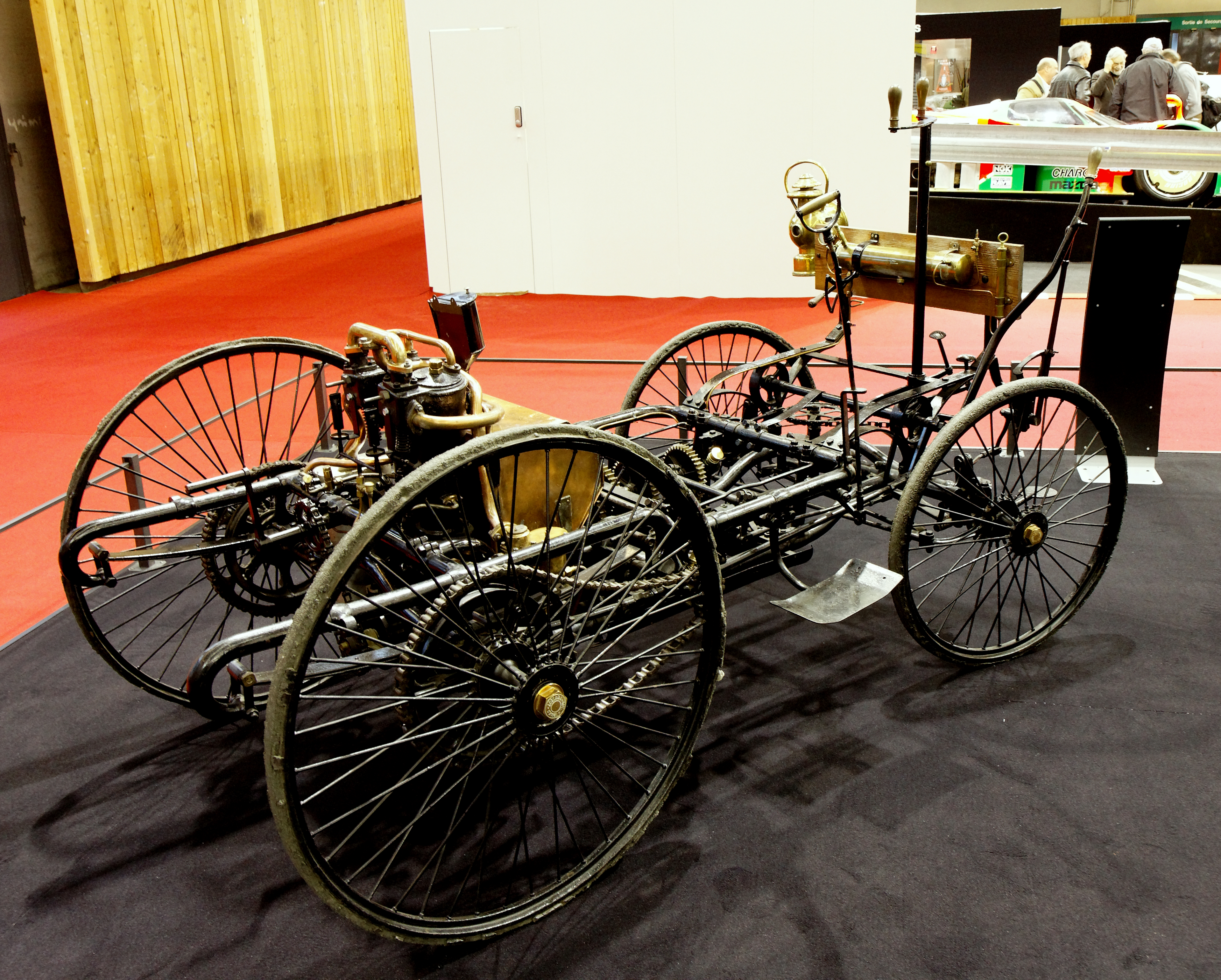 Photographie prise lors du salon rétromobile 2011 à Paris, porte de Versailles.